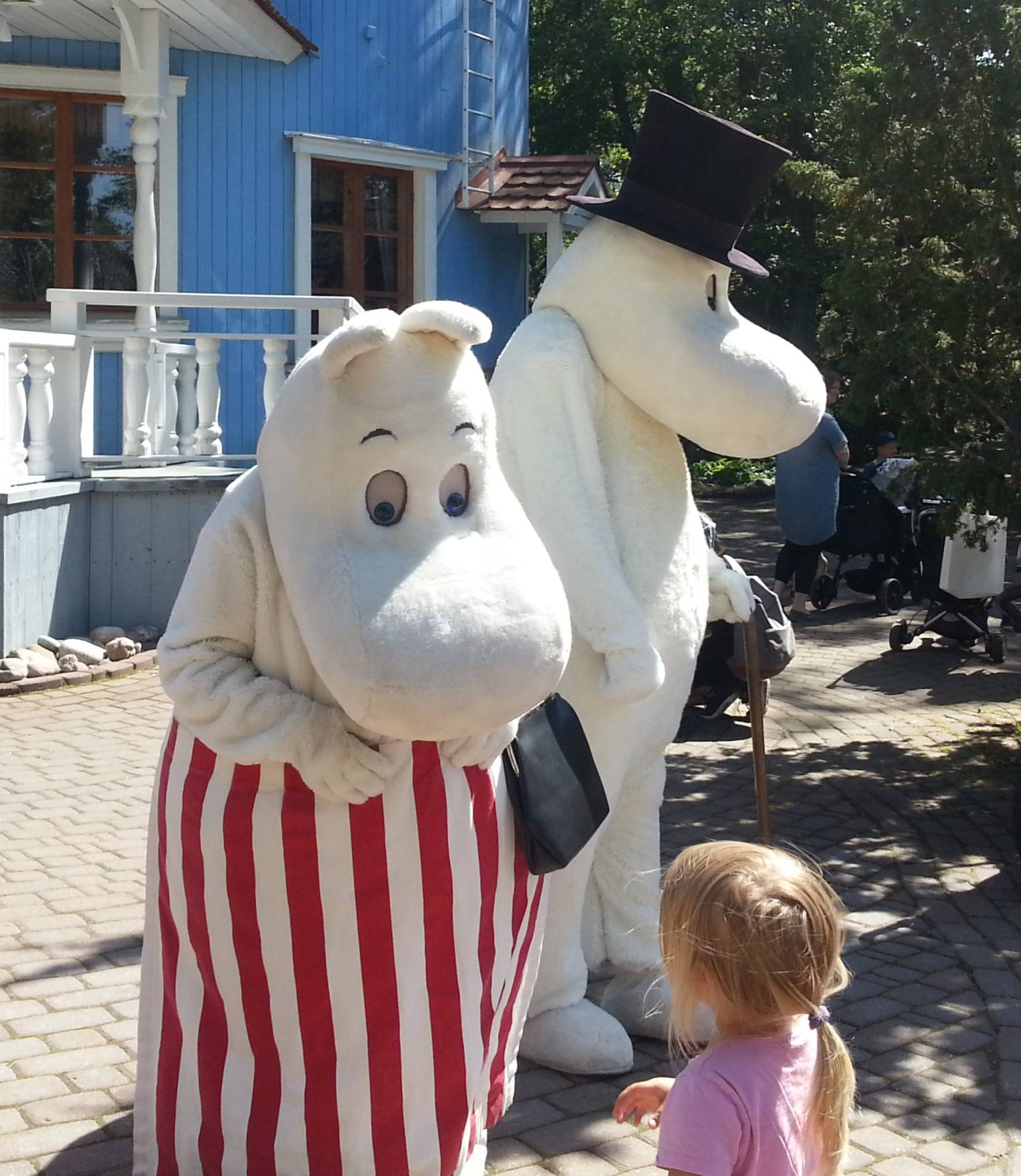 Moominmamma and Moominpappa, Moominworld, Finland